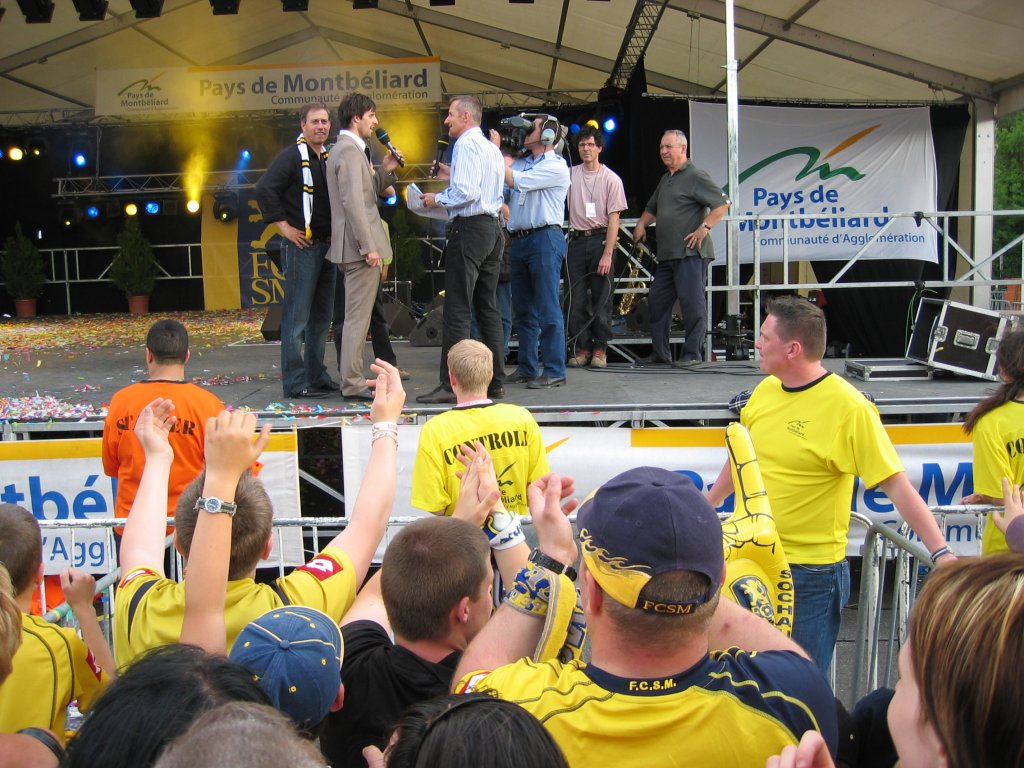 Alain Perrin (entraineur du FC Sochaux) au retour du FC Sochaux au Stade Bonale de Sochaux - Coupe de France 2007